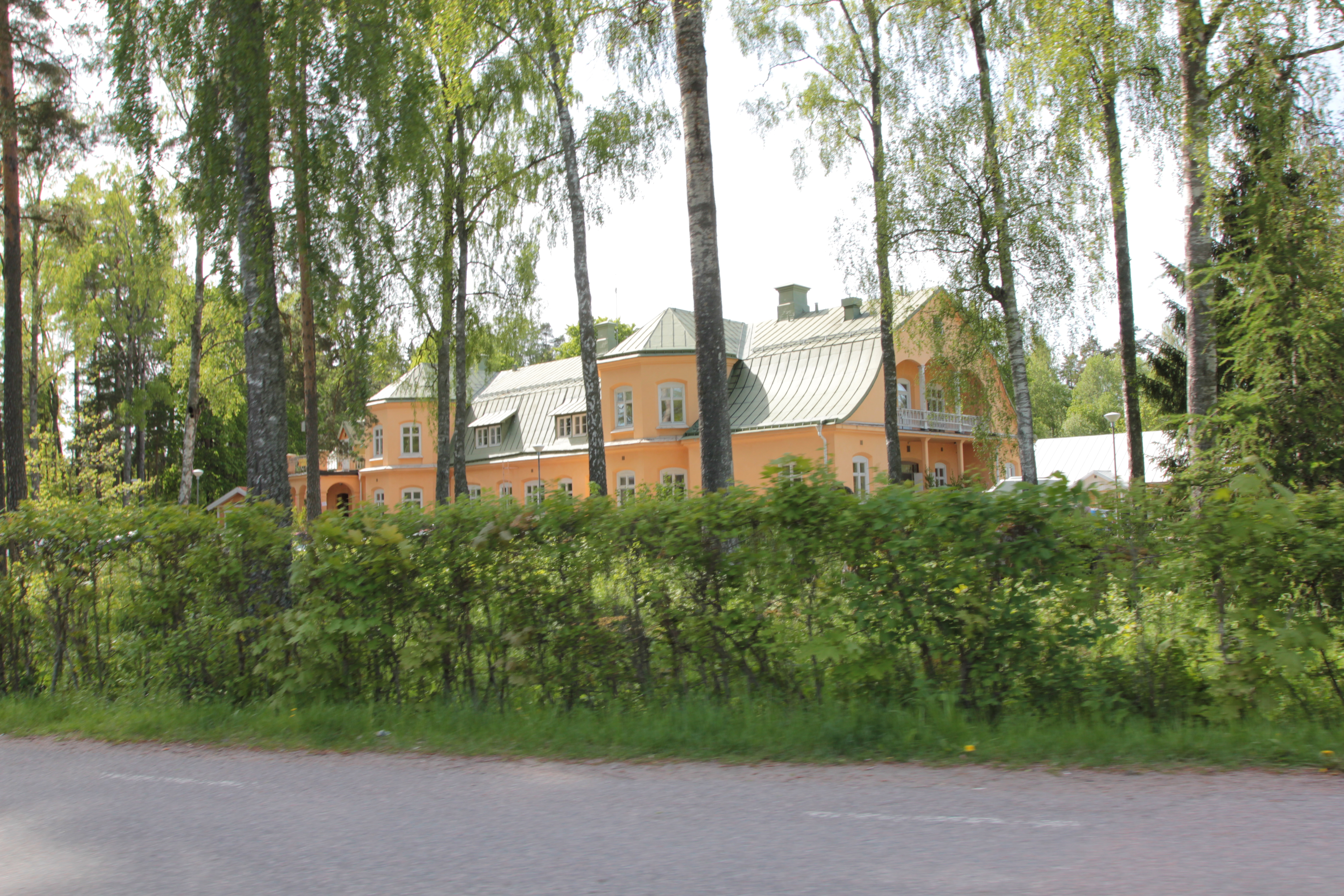 Jaktslottet (numera Eric Sahlström Institutet) i Tobo, byggt 1888–1889. Foto uppladdat som en del i Bergslagssafarin 26 maj 2012.